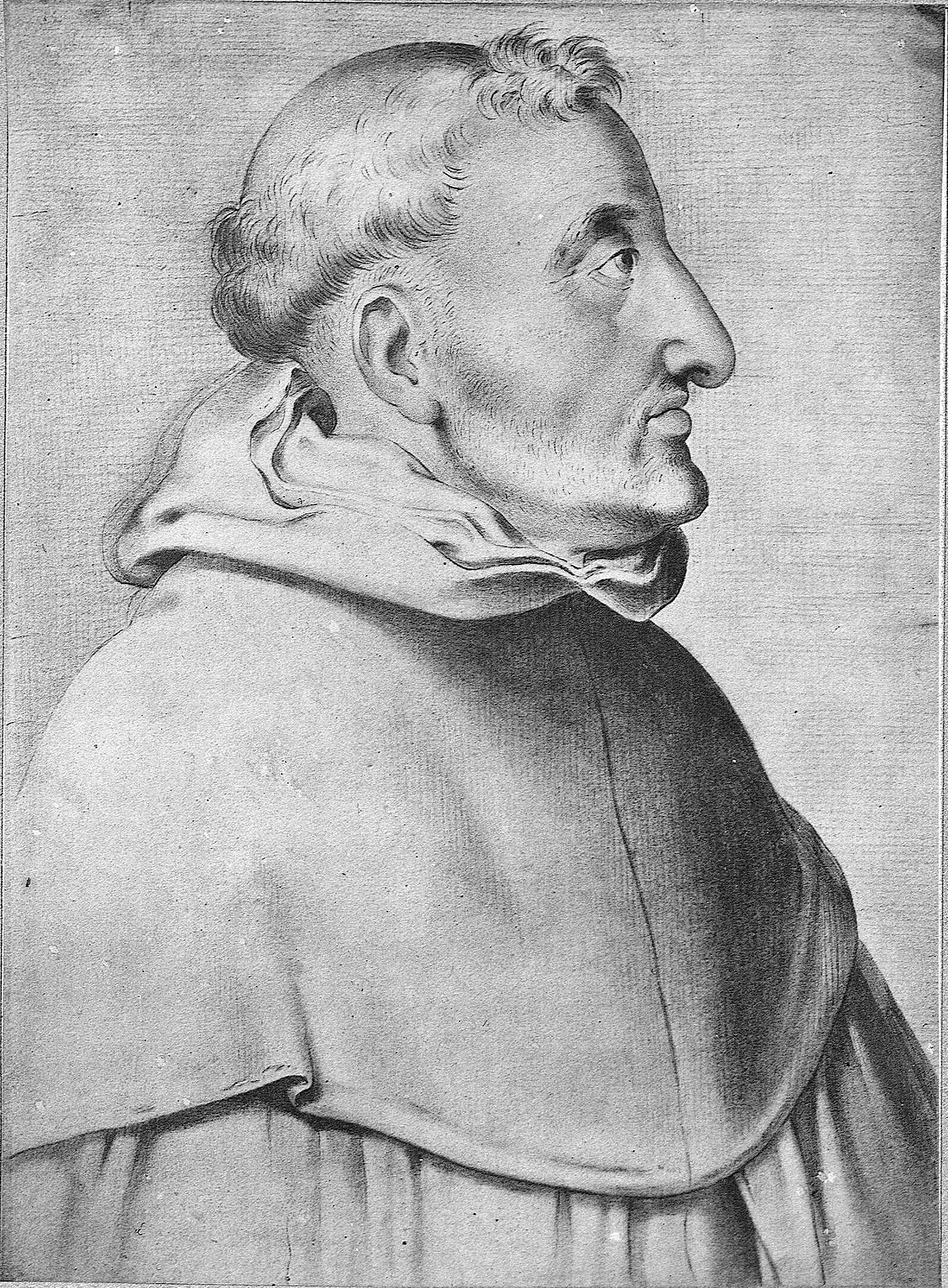 Detalle del retrato de Fray Luis de Granada en Francisco Pacheco, (1564-1644) El libro de descripción de verdaderos retratos, ilustres y memorables varones, [Sevilla, s.n., s.a.]- Real Academia de la Historia (Madrid). Signatura: 1/736